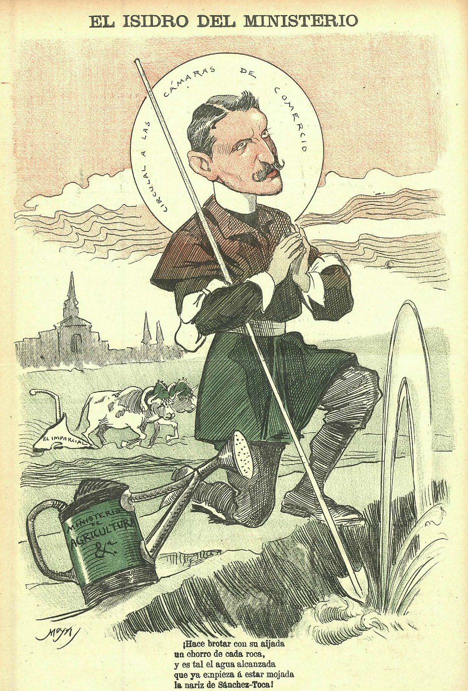 El Isidro del ministerio, en la revista satírica española Gedeón.